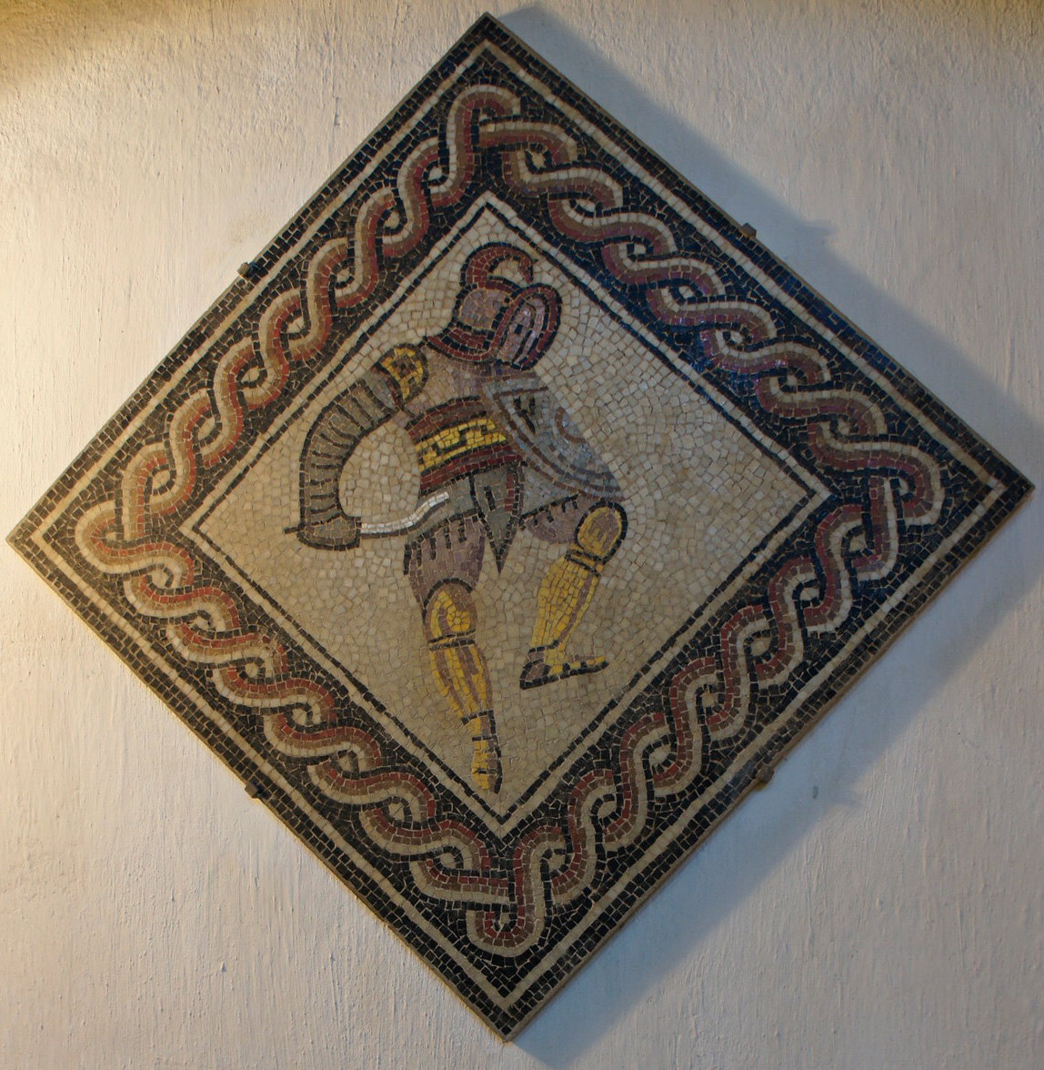 Mosaïque se trouvant dans une maison de Reims représentant les jeux du cirque, Ie siècle.